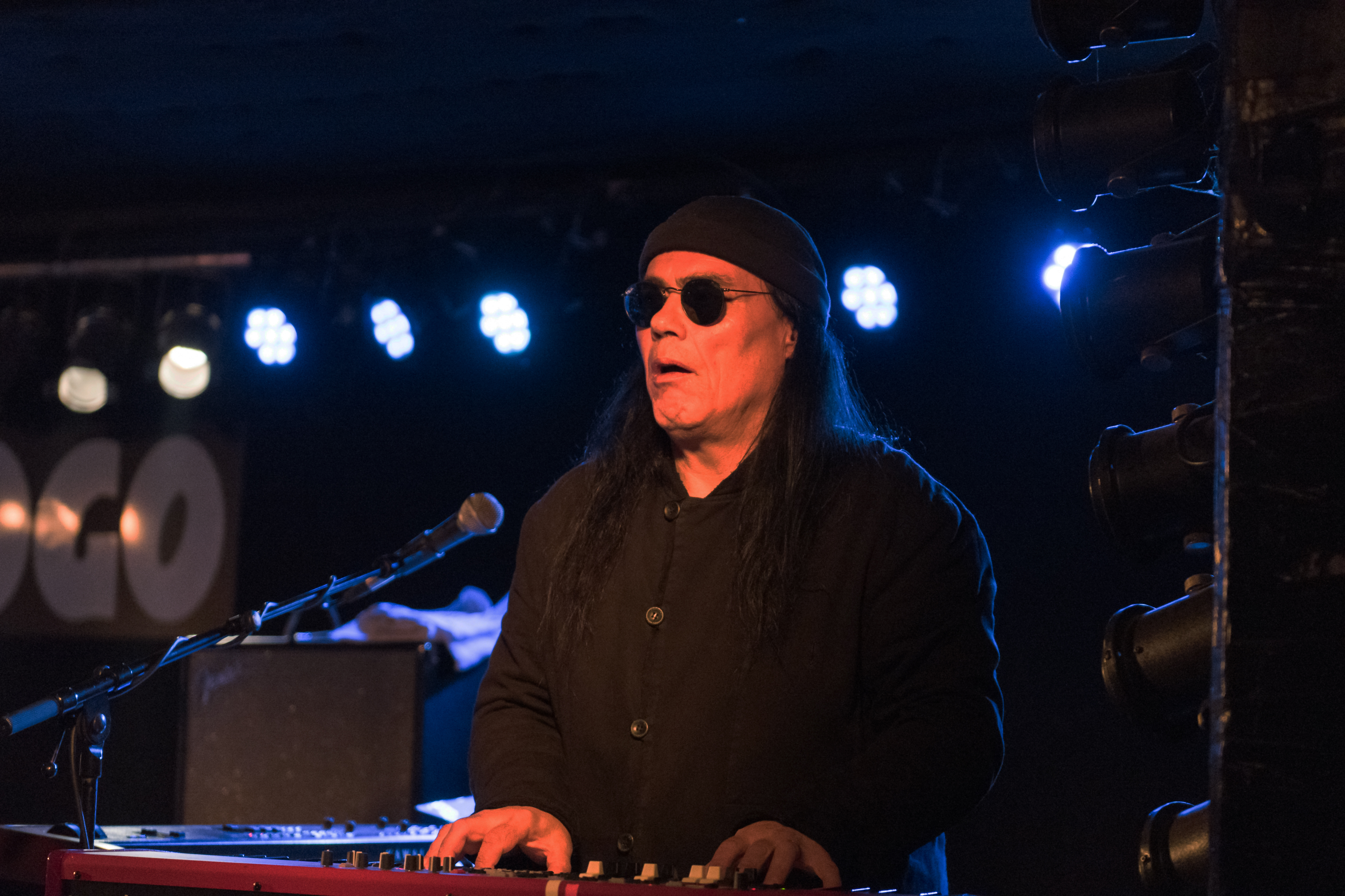 Zöller & Konsorten bei der Flucht nach vorn Tour 2016 im Logo Hamburg